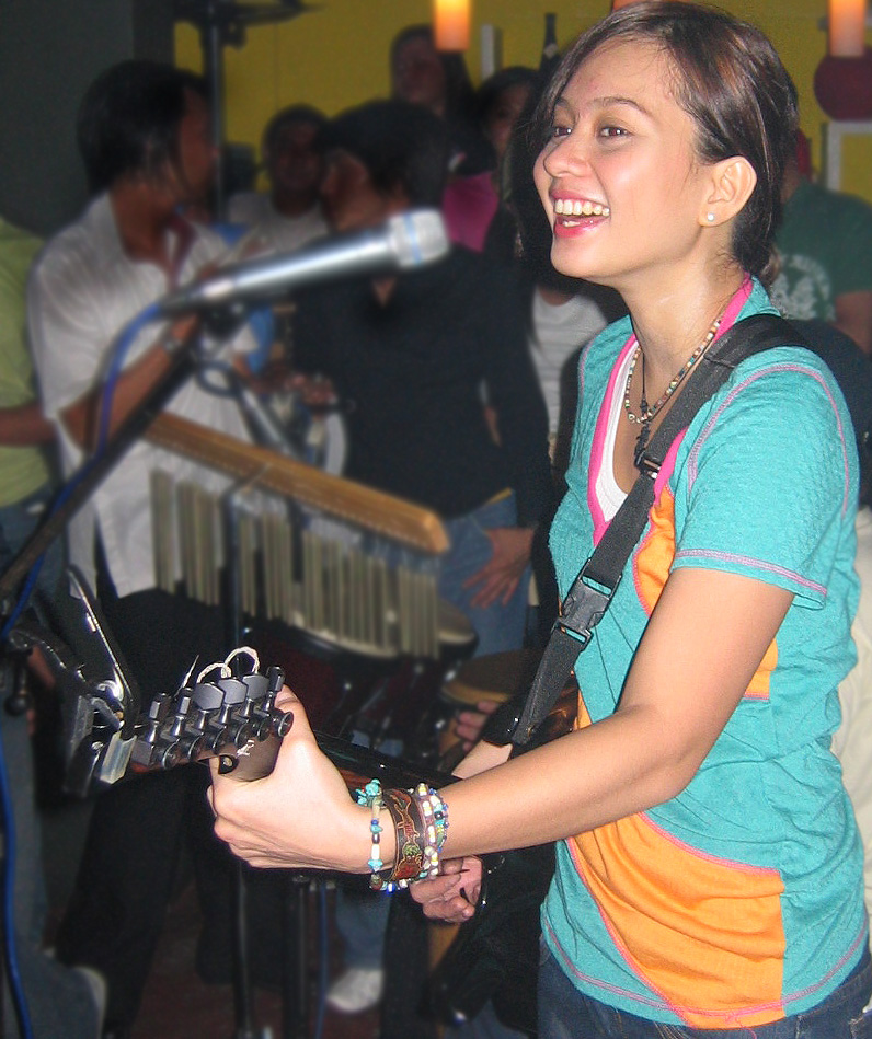 Kitchie Nadal